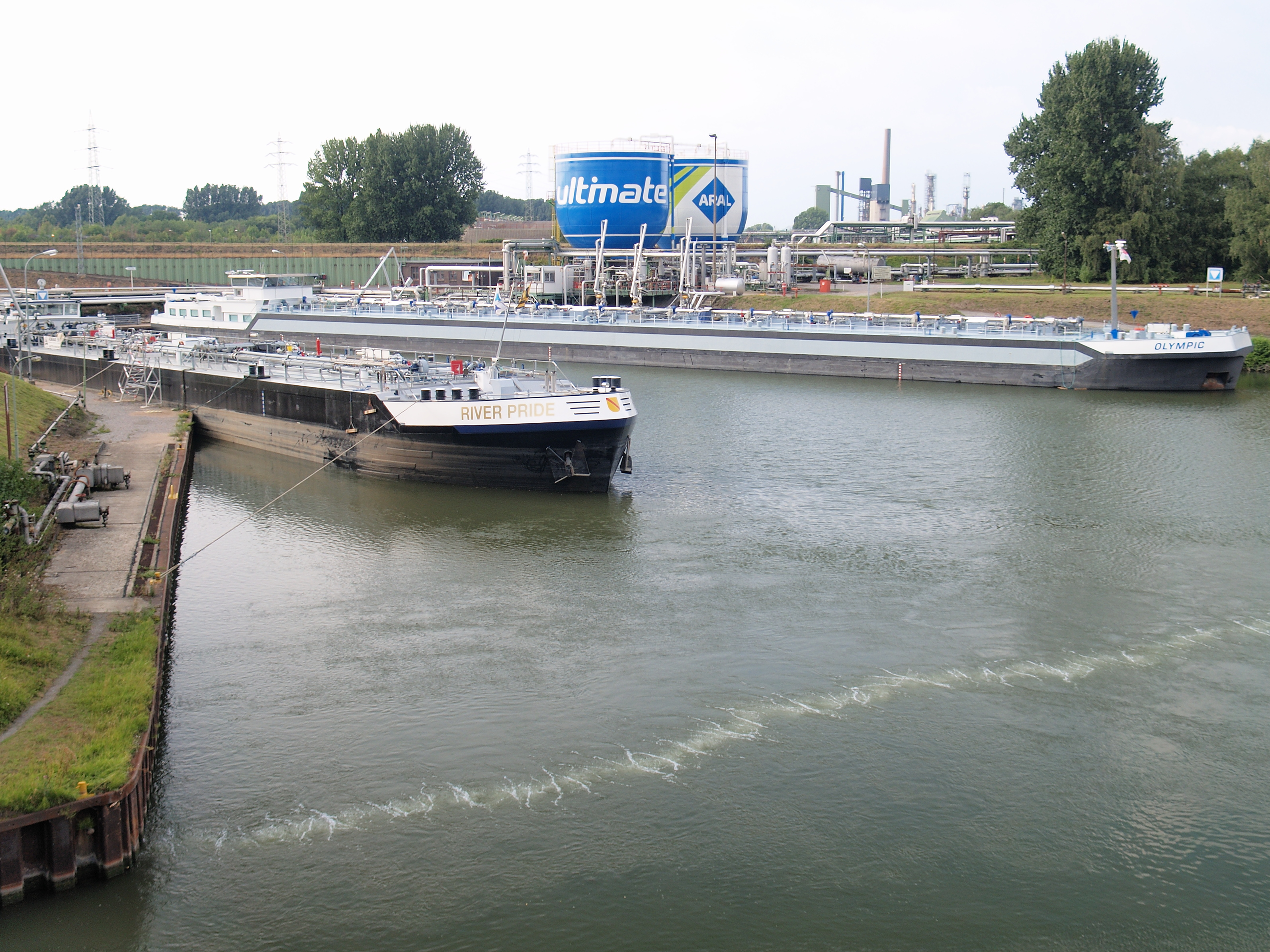 Hafenbecken östlich der Eisenbahnbrücke der BP Gelsenkirchen GmbH am Rhein-Herne-Kanal in Gelsenkirchen